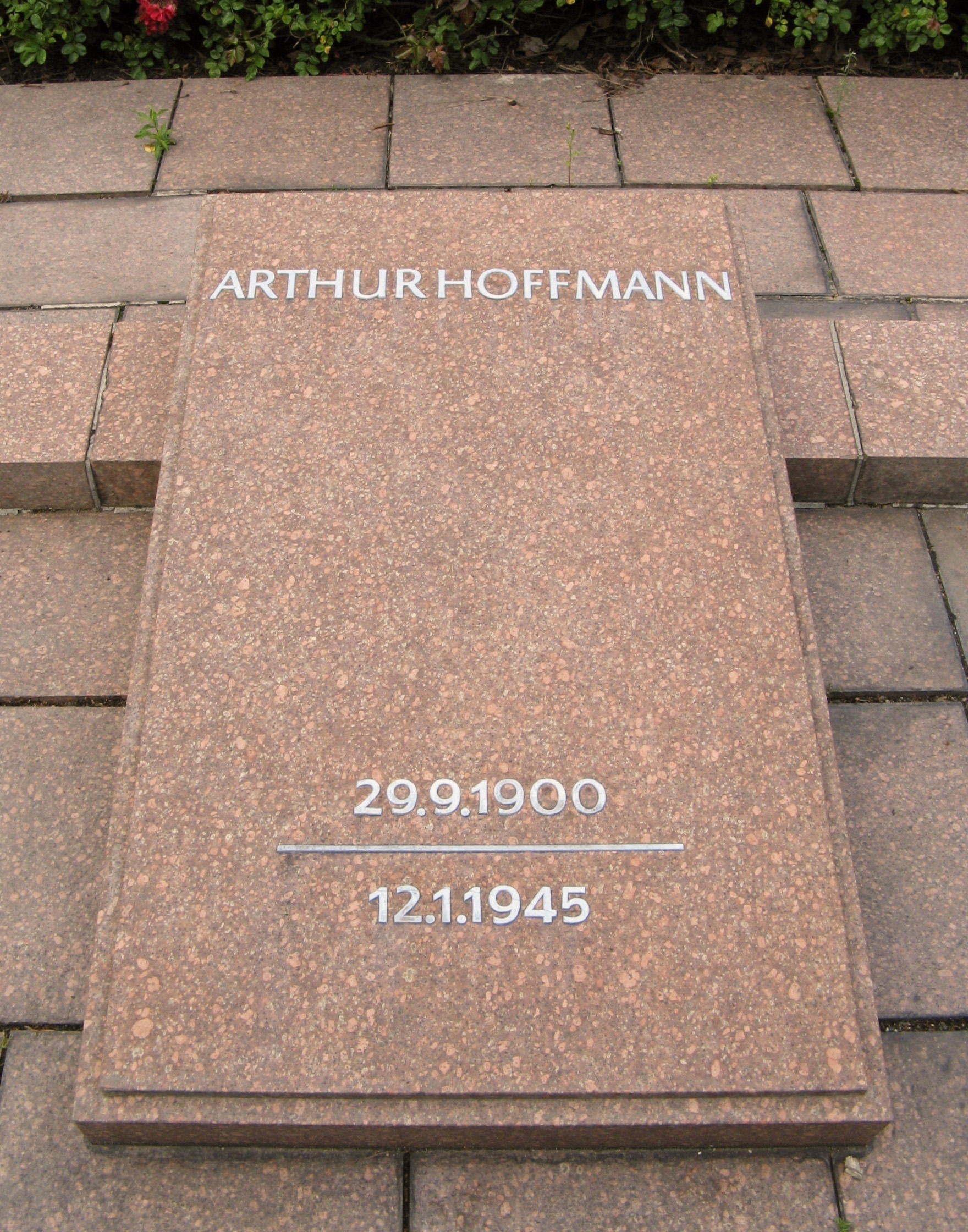 Grabplatte von Arthur Hoffmann am Ehrenmal für die Widerstandskämpfer der so genannten Schumann-Engert-Kresse-Gruppe auf dem Leipziger Südfriedhof, Hauptachse